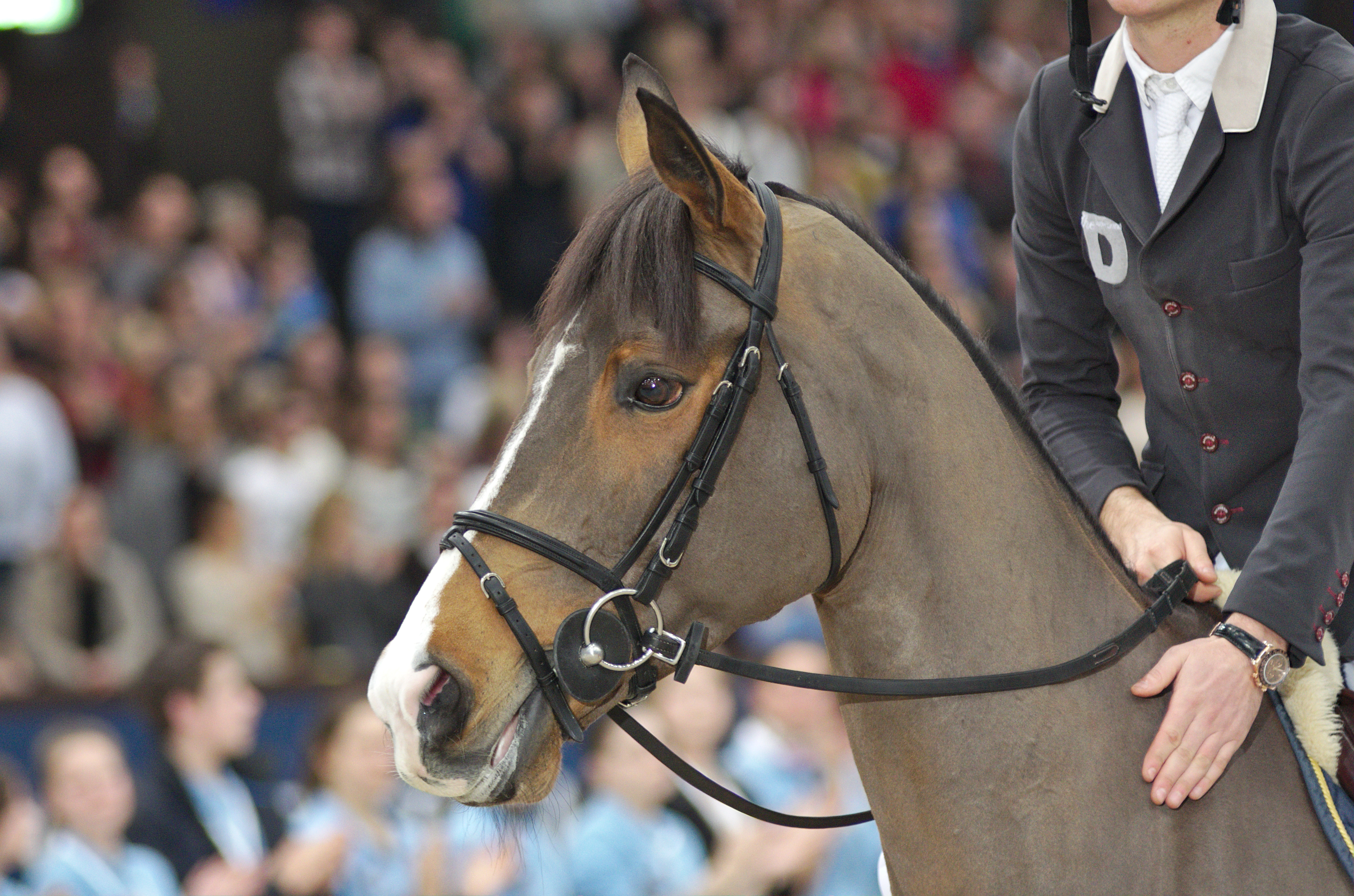 CHI Genève 2013 - 20131214 - Steve Guerdat et Jalisca